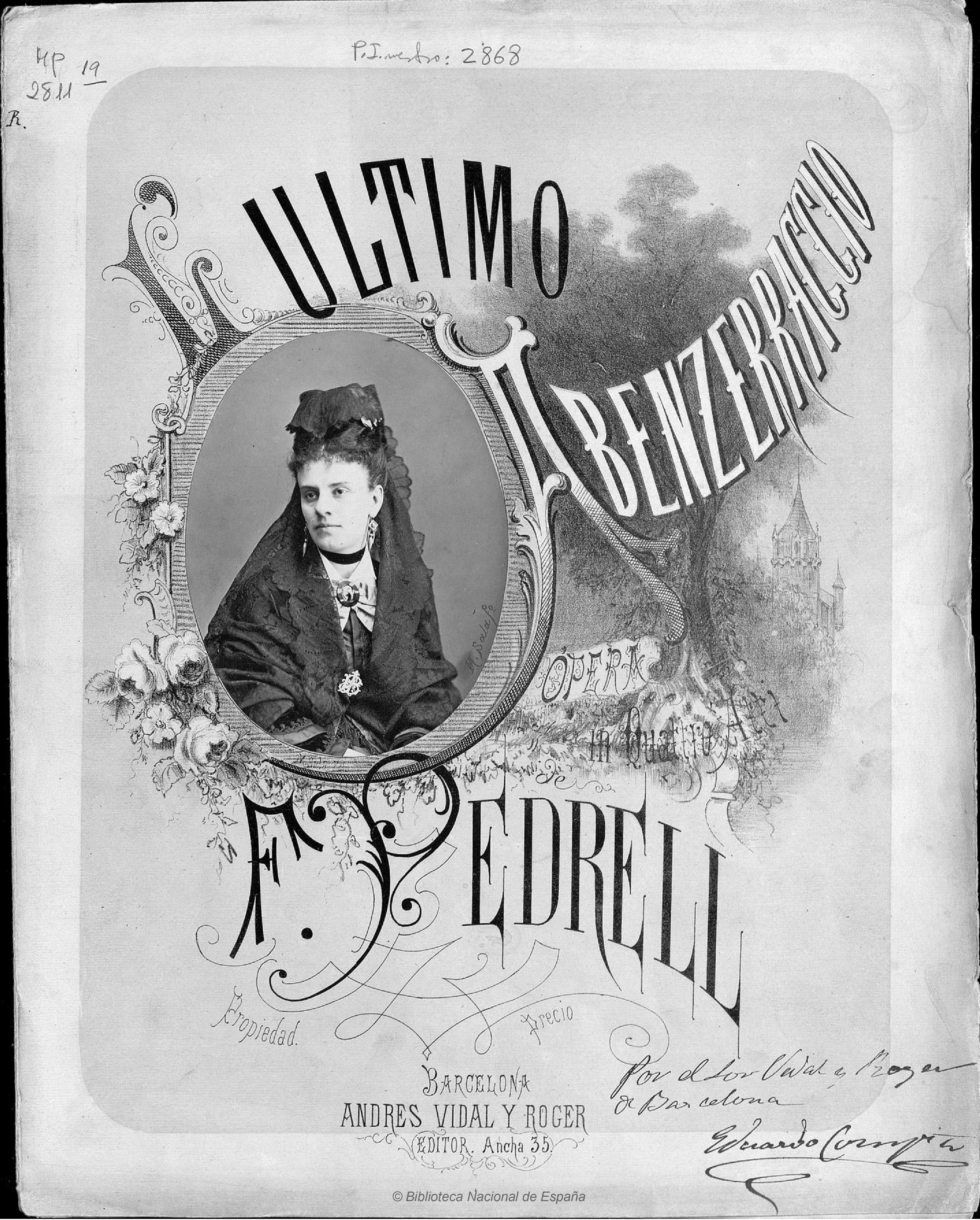 Giuseppina Borsi de Giuli en un cartell de l'òpera L'ultimo abenzeraggio de Felip Pedrell al Liceu de Barcelona modifica